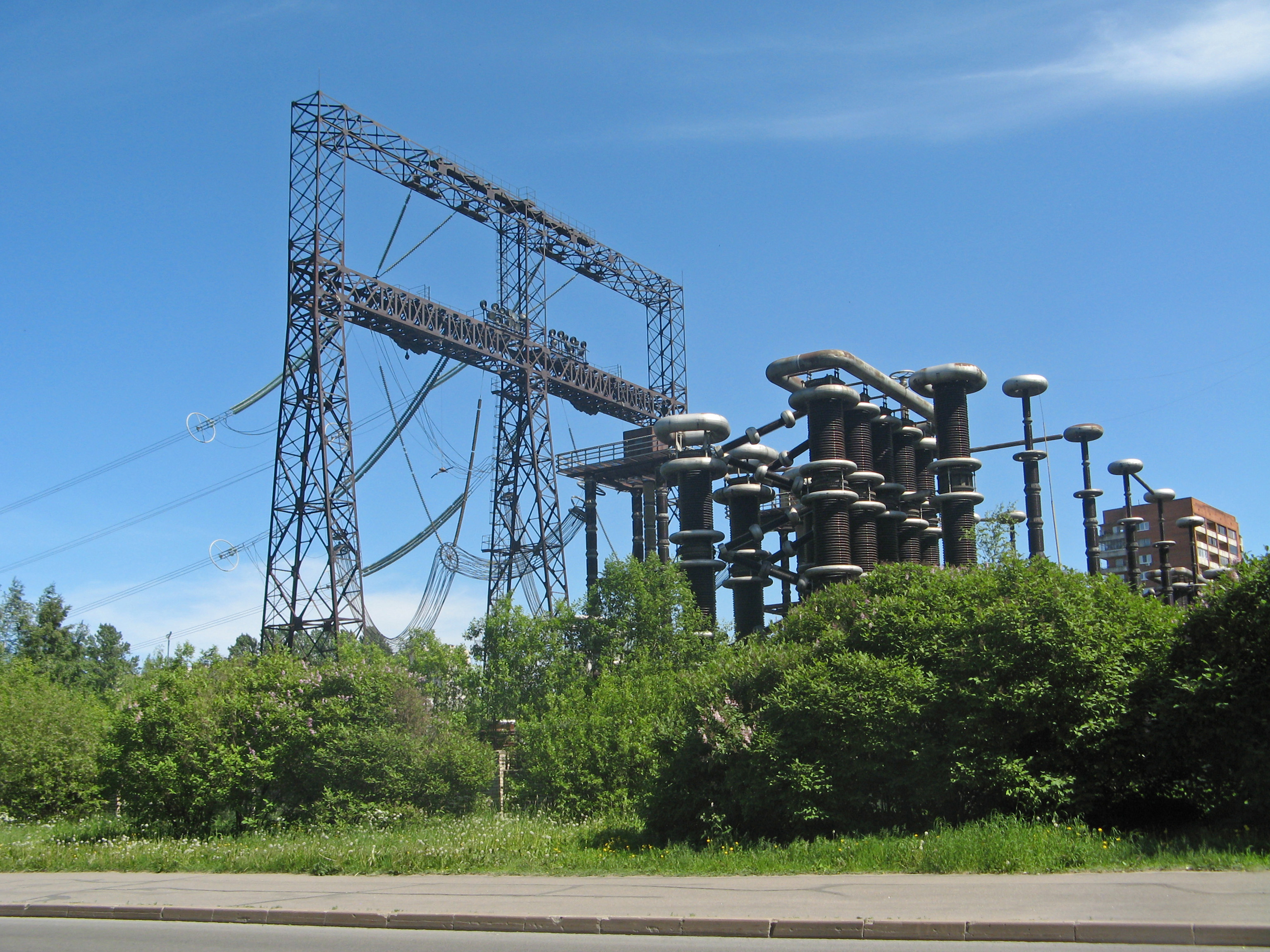 Улица Академика Константинова, Санкт-Петербург. НИИПТ